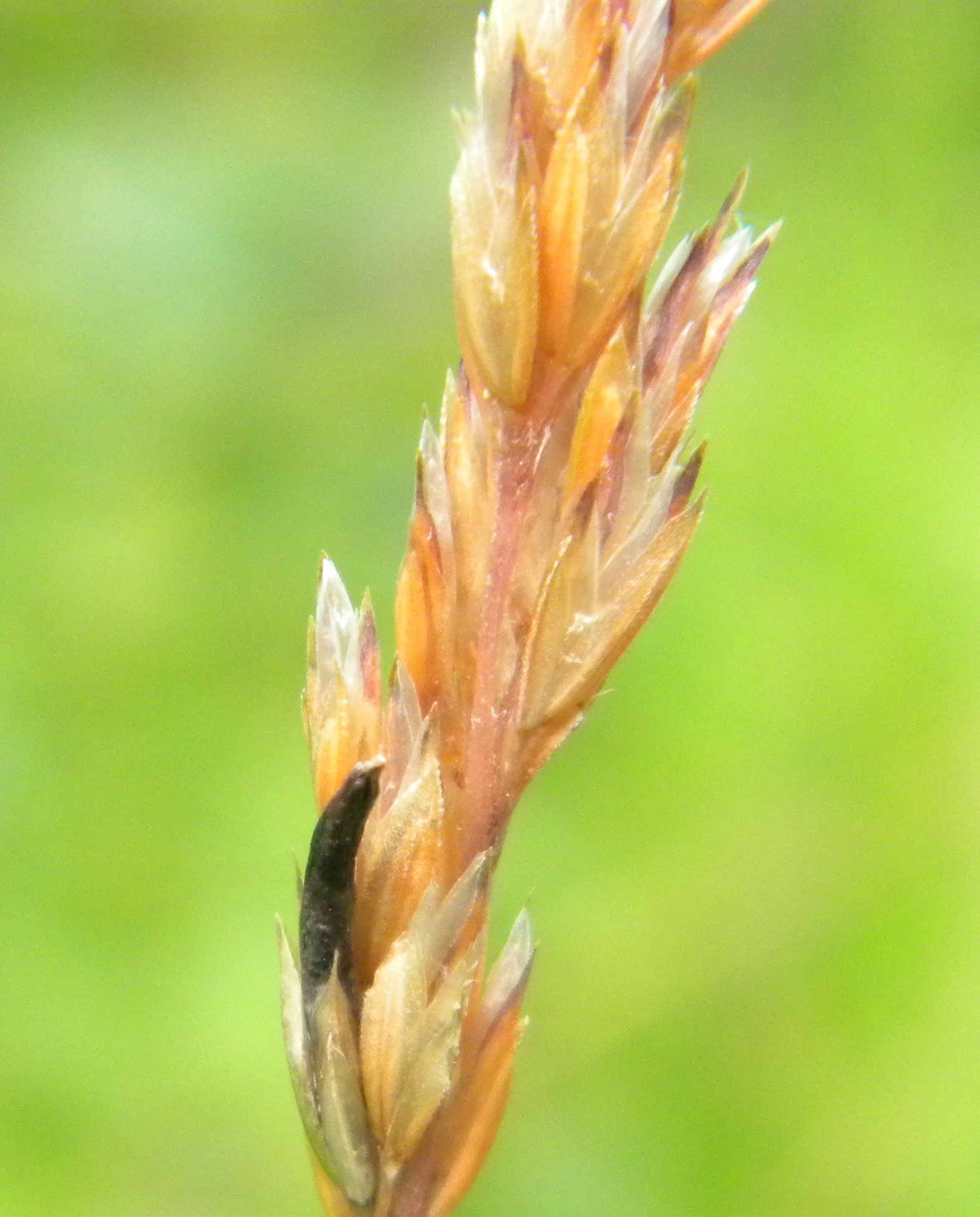 Koeleria pyramidata Nantoux (France)